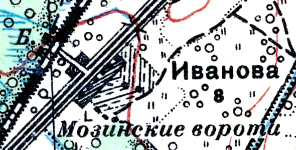 Топографическая карта Ленинградской области, квадрат О-36-13-А-б (Пос. Тайцы), деревня Ивановка